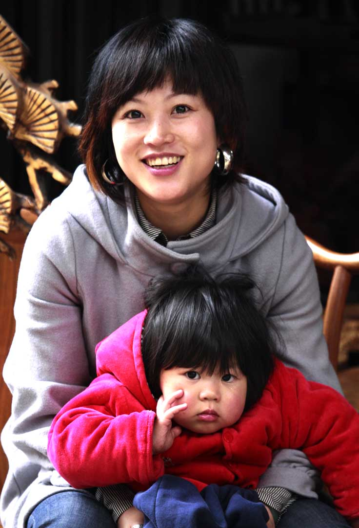 China